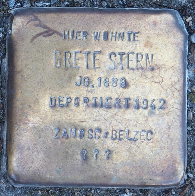 Stolperstein in Soest Niedergasse 2, Grete Stern